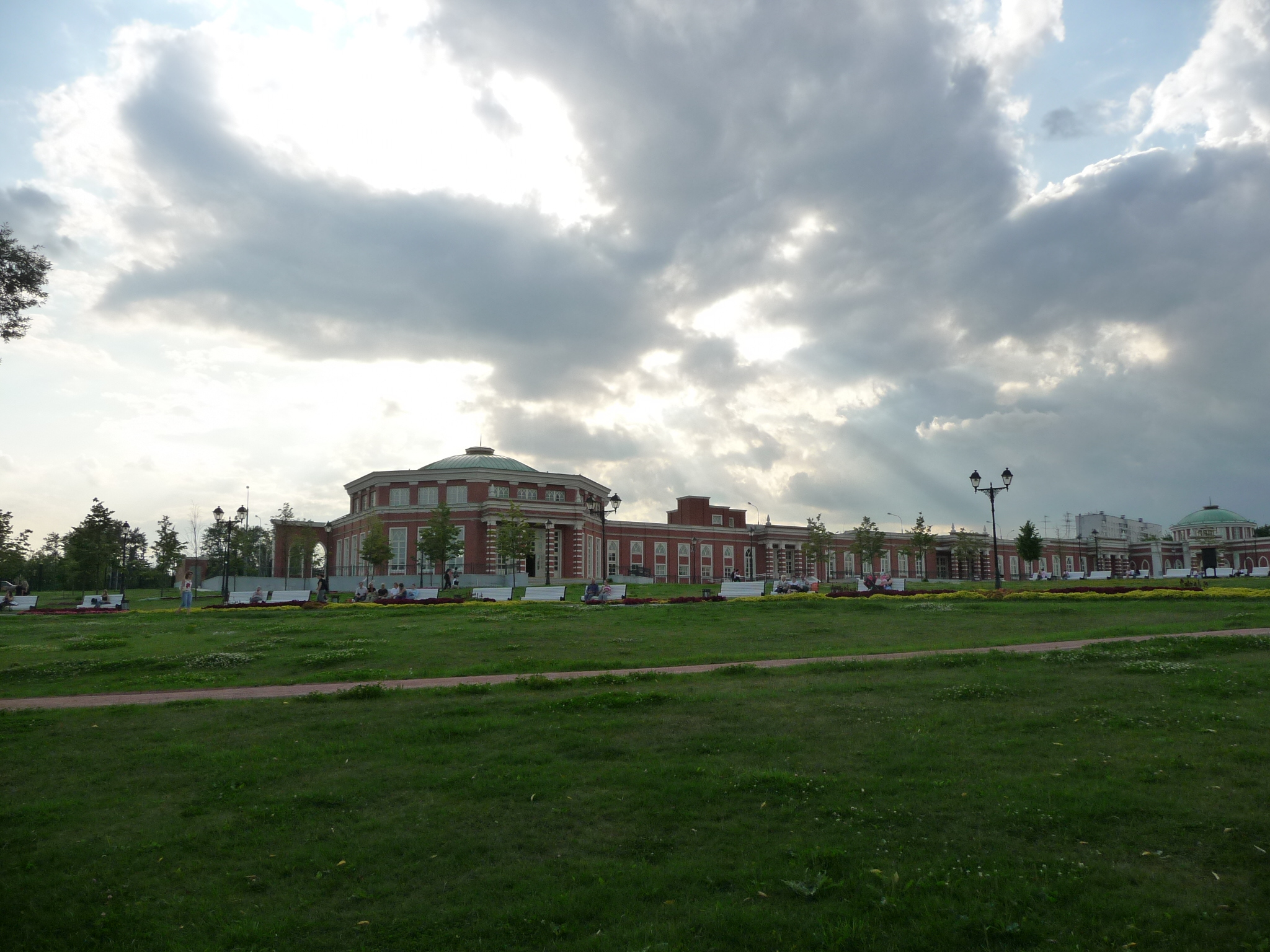 Palace-p1040288.jpg